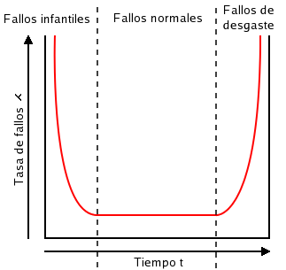 Gráfica que representa la curva de la bañera